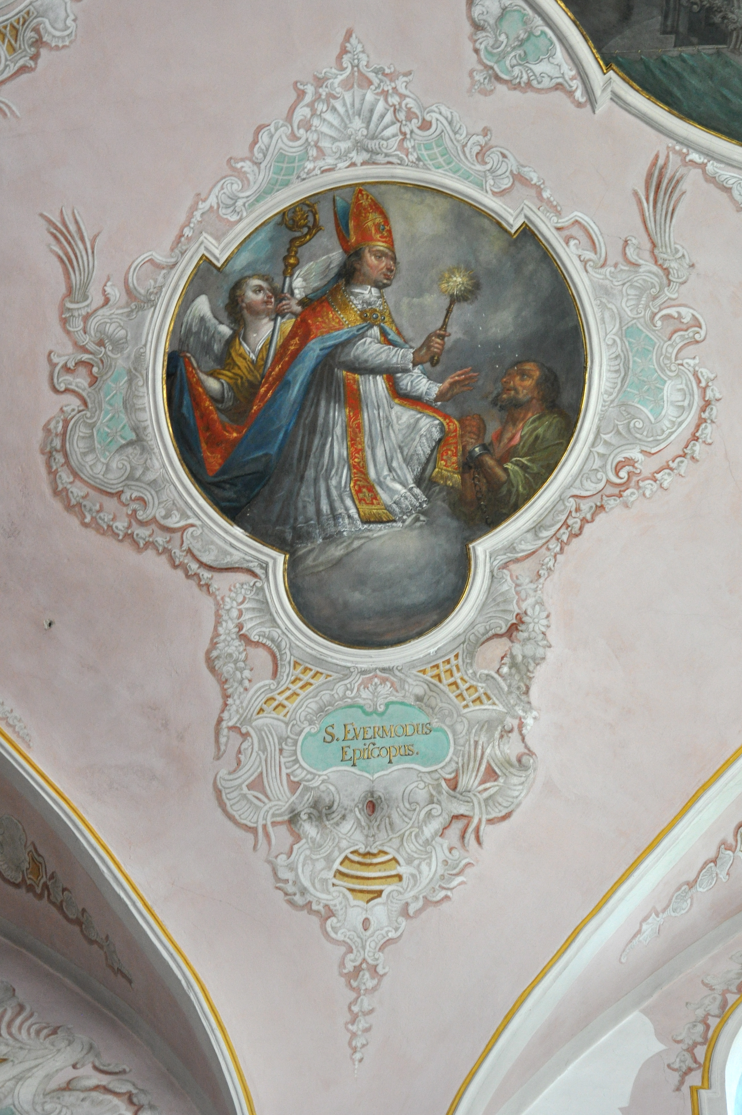 Bad Schussenried, Pfarrkirche St. Magnus (ehemalige Klosterkirche)Fresken im Chor von Gabriel Weiß, 1744 Prämonstratenserheilige: Hl. Evermodus (Evermod, Bischof von Ratzeburg, † 1181)